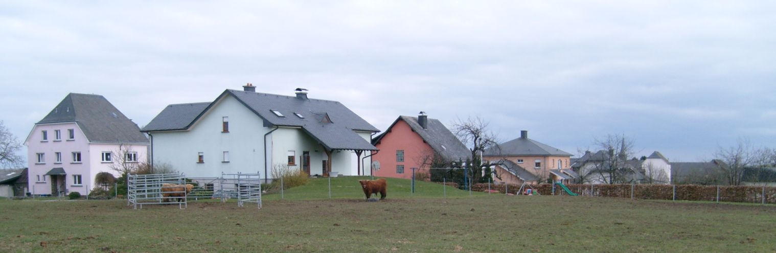 Vue vun Nordwesten aus op Grooljen. 03.04.2008.